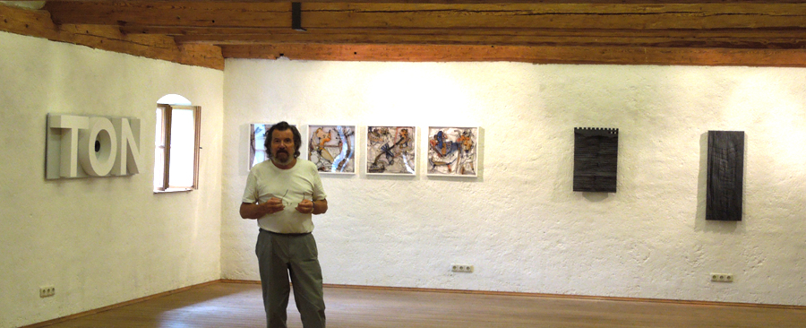 TONPAPIERTON Dokumente einer Begegnung, Ausstellungseröffnung im Kubinhaus Zwickledt 2012